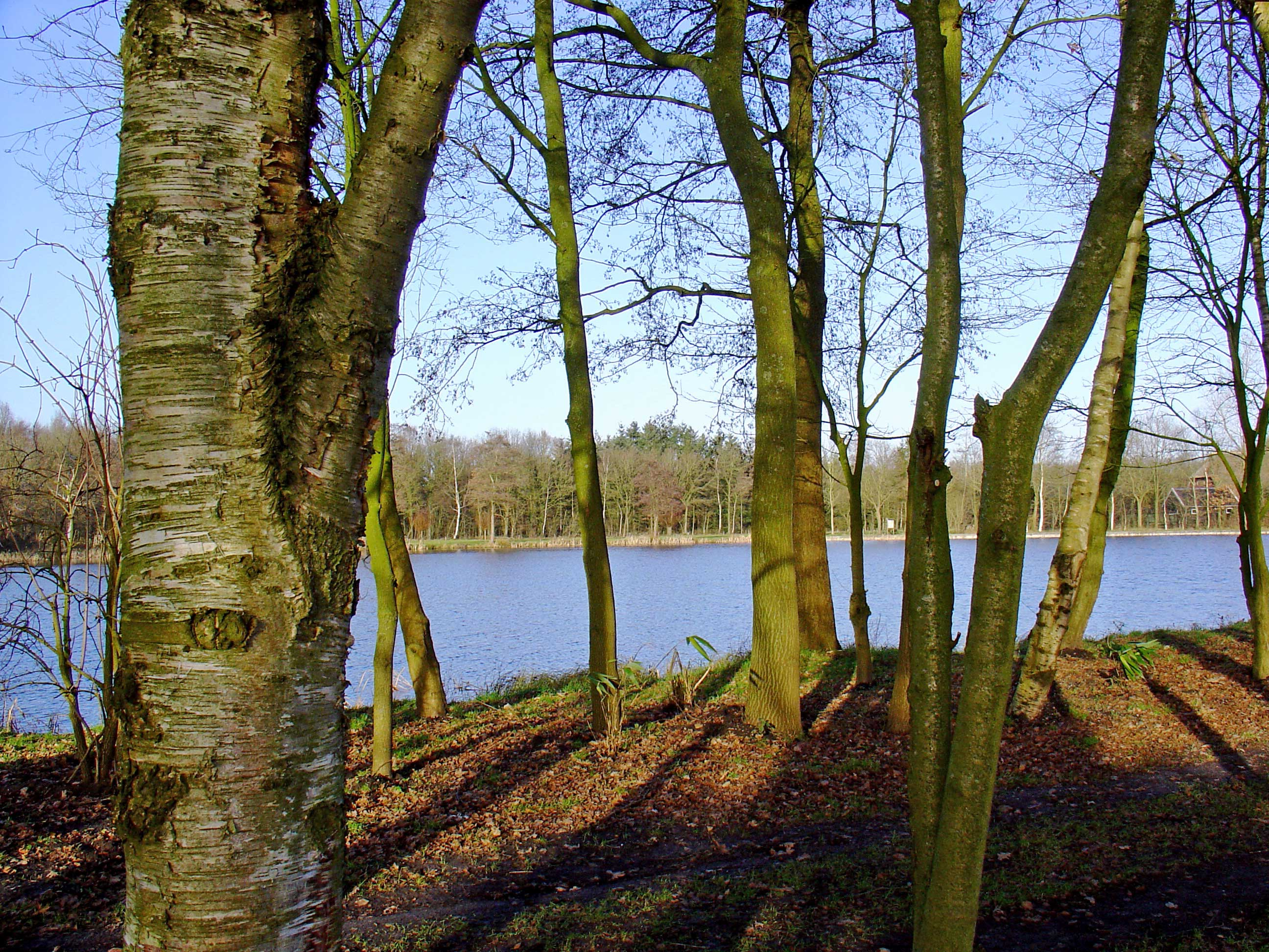 Schaapvolte (Schaopwas) bij Eexterhalte in de gemeente Aa en Hunze